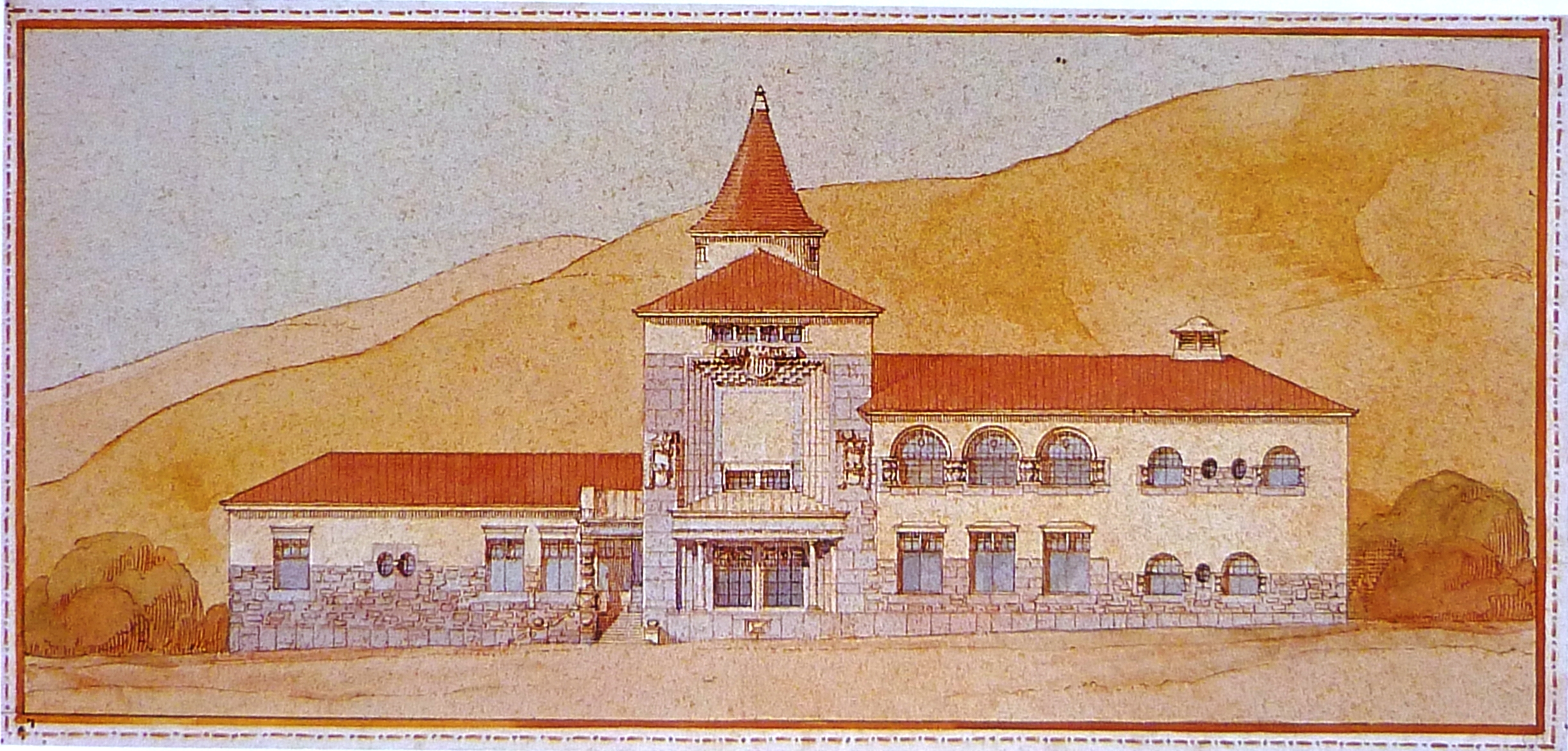 Porjecte presentat a concurs en col·laboració de Josep M. Pericas